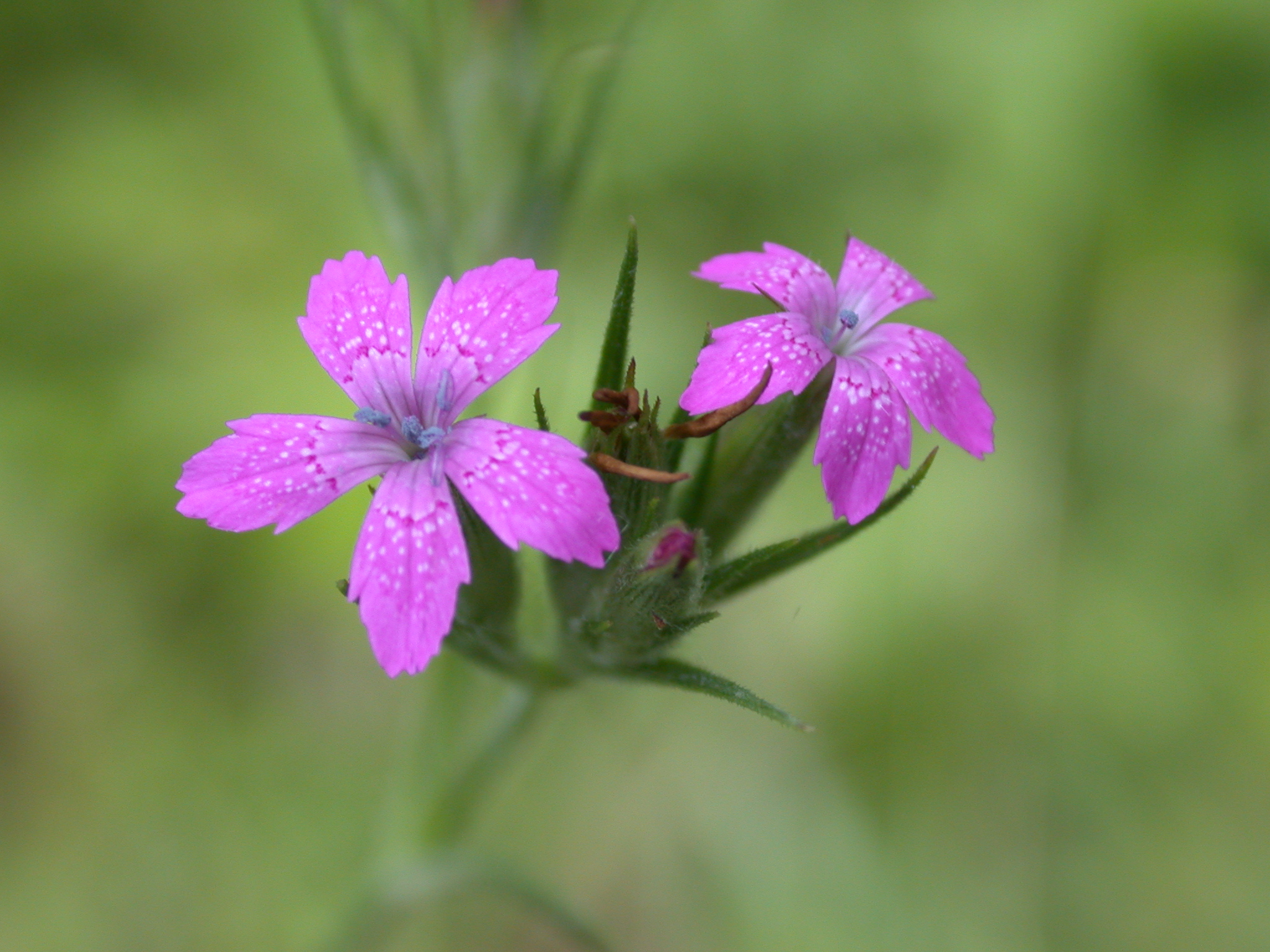 Dianthus armeria Forêt de la Reine (Meurthe-et-Moselle), France